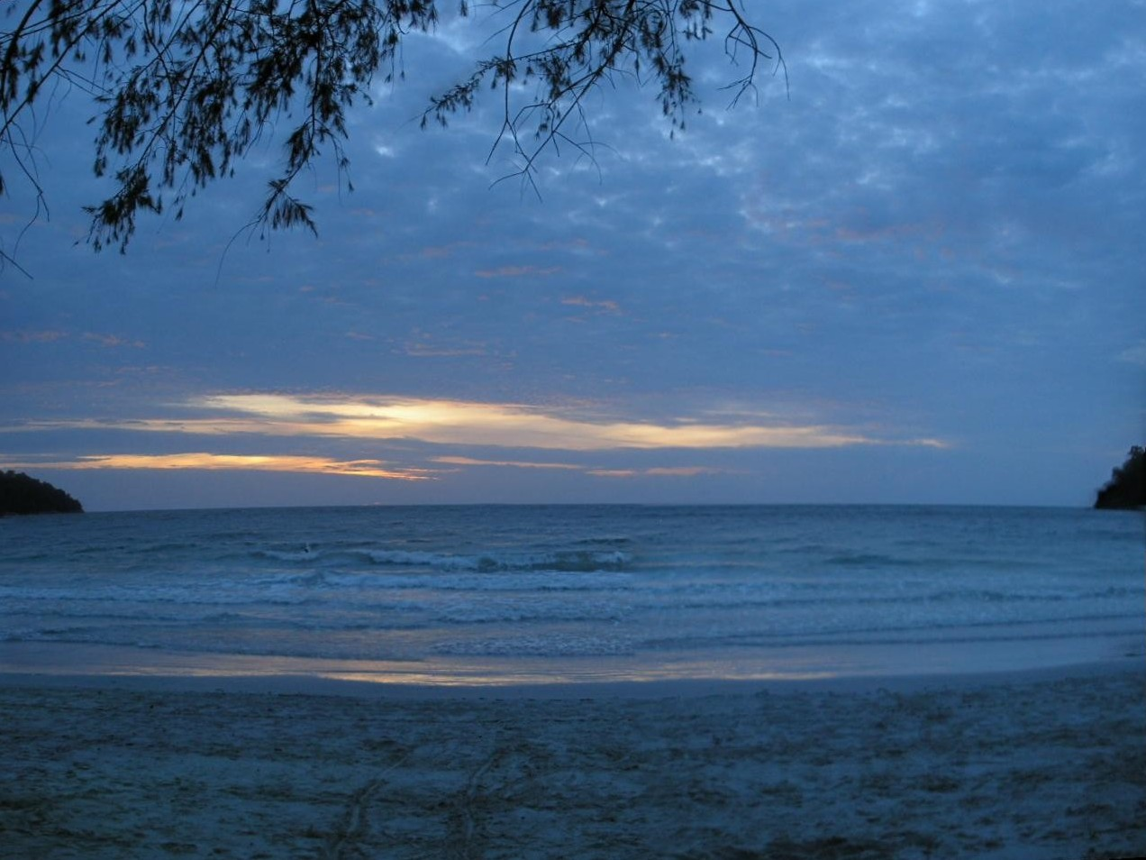 Sunset at Pangkor Island.